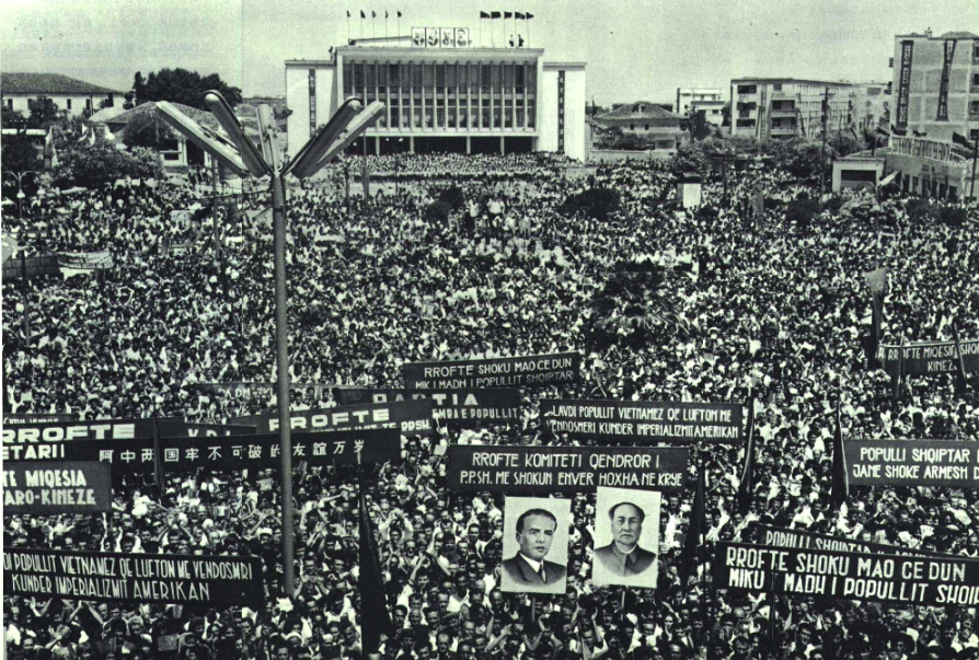 1966-10 1966年阿尔及利亚与中国